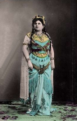 Fodor Aranka magyar opera-énekesnő. Postcard